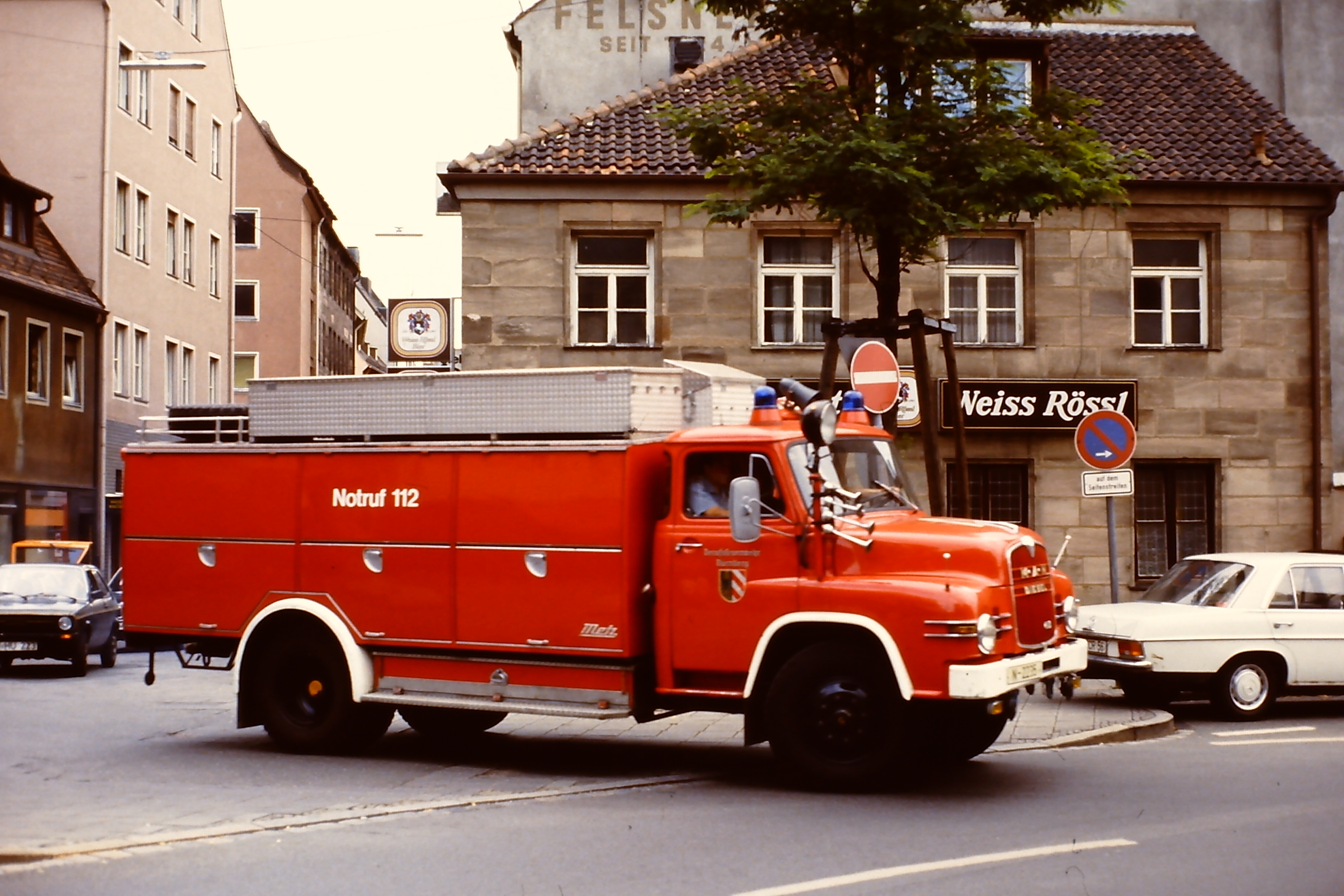 MAN Gerätewagen-Öl mit Metz-Aufbau der Feuerwehr Nürnberg (Feuerwache 3)